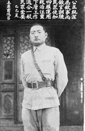 吉鸿昌 (Ji Hongchang)